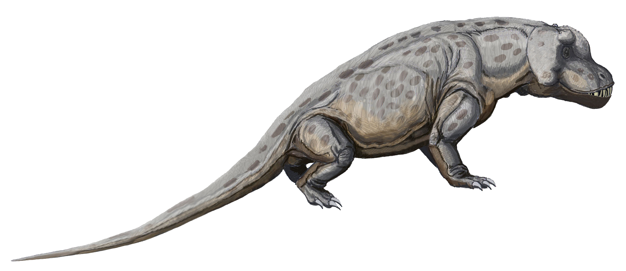 Антеозавр